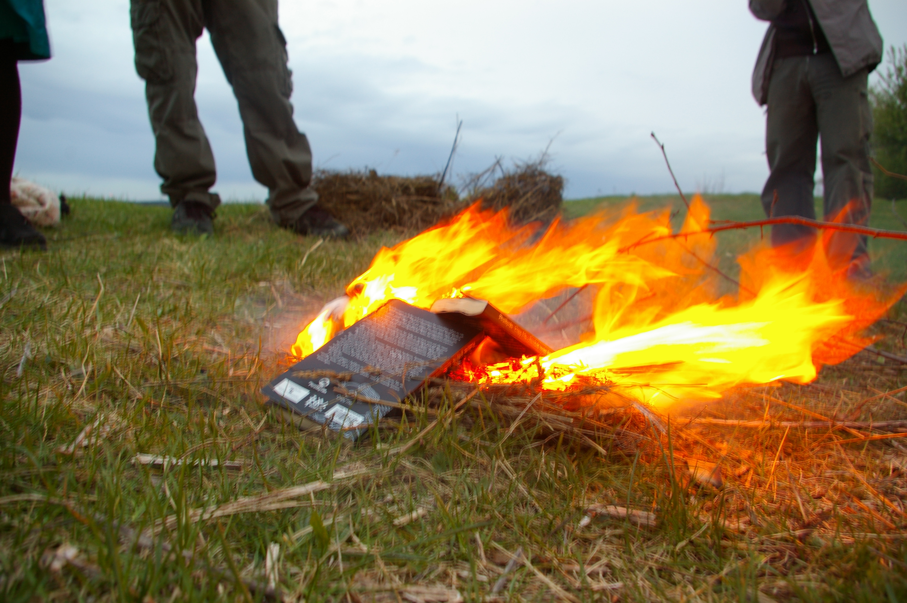 Book burning